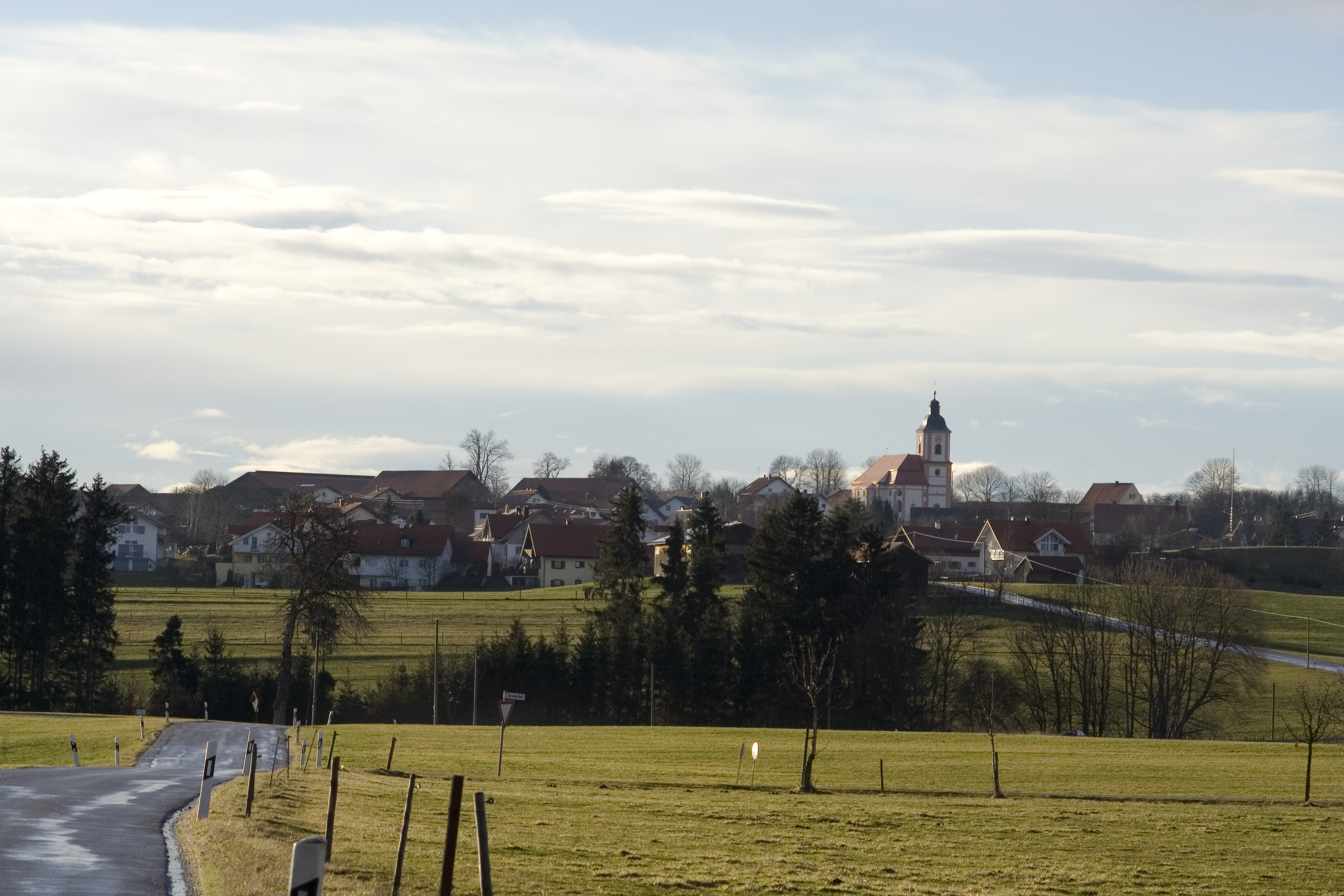 Reichling, Bavaria, Germany, Public Domain, Picture from Alexander Heger in March 2008